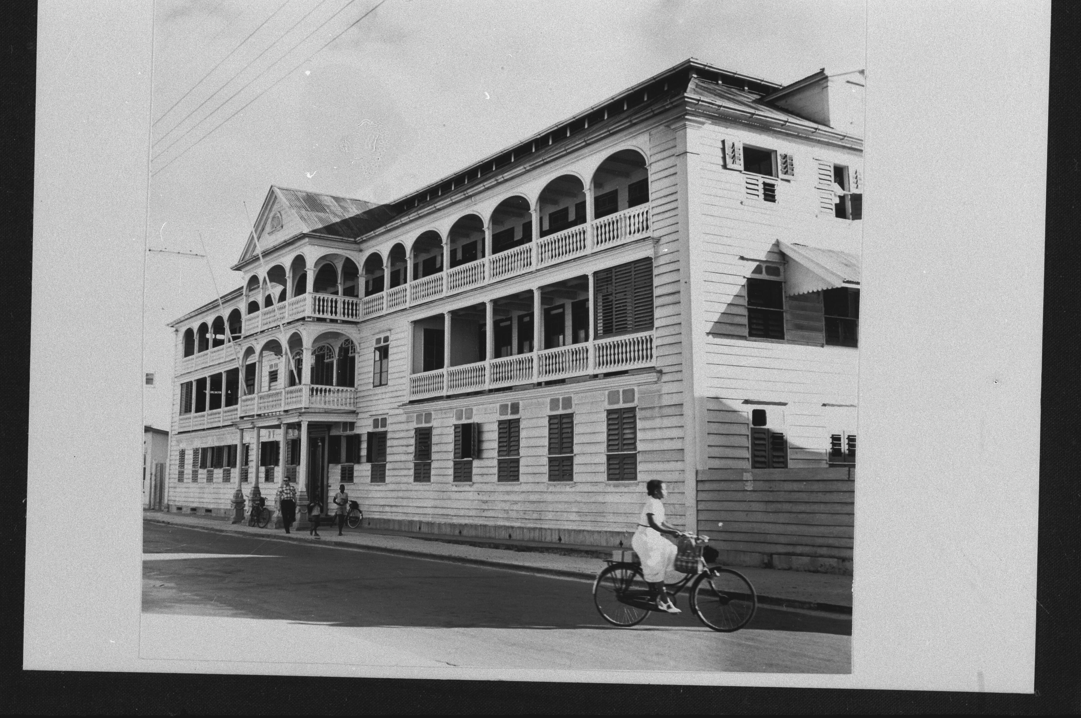 Patershuis, straatzijdeOnderwerp: patershuizen